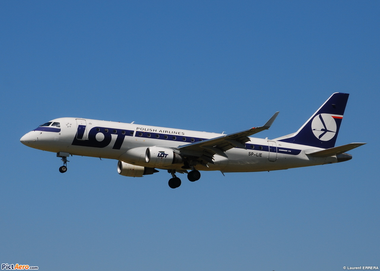 Photo prise à l'aéroport de Barcelone-El Prat (LEBL) en Espagne. Picture take at Barcelona-El Prat Airport (LEBL) in Spain.